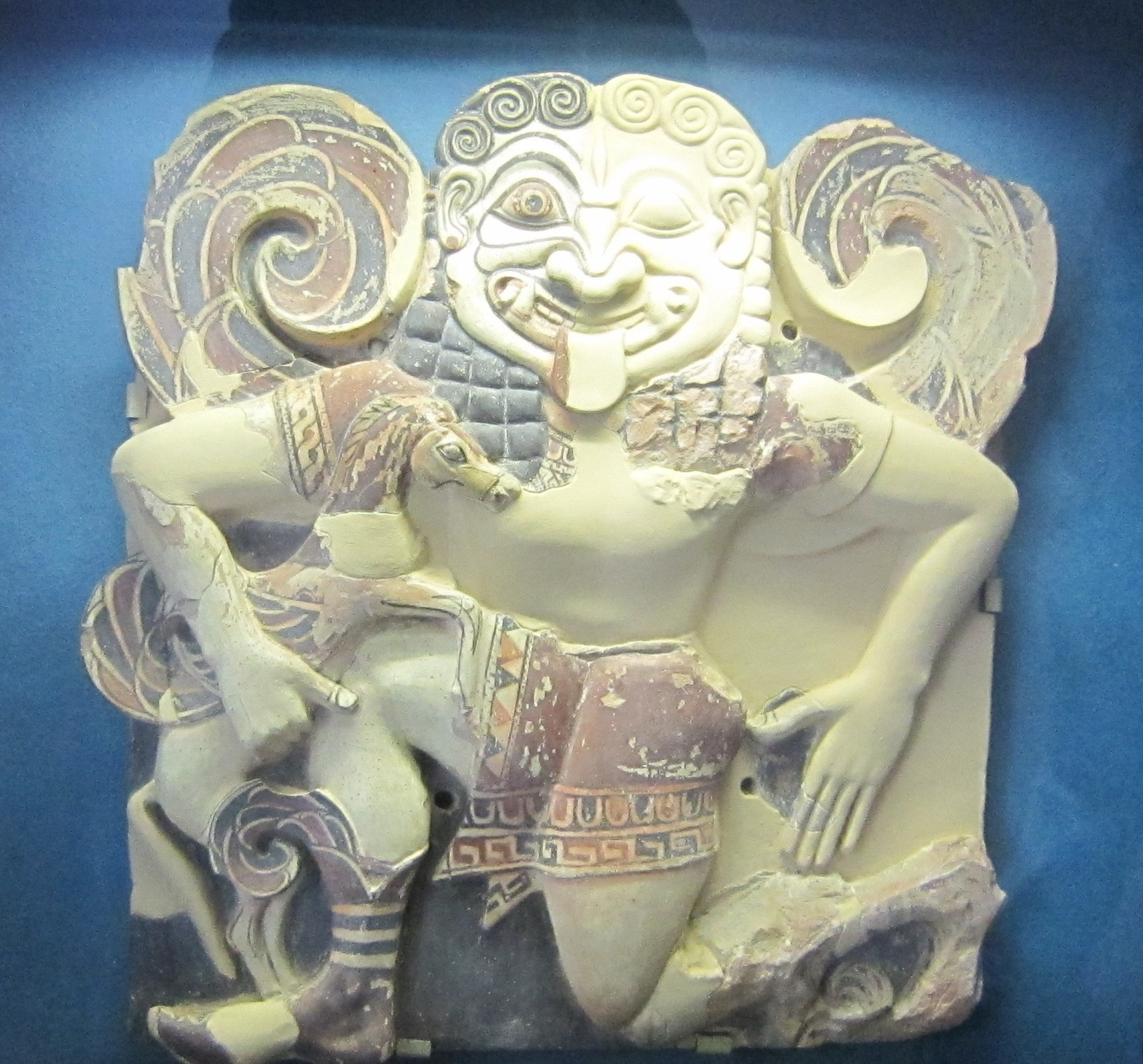 Gorgone greca, esposta nel Museo archeologico regionale di Siracusa "Paolo Orsi".